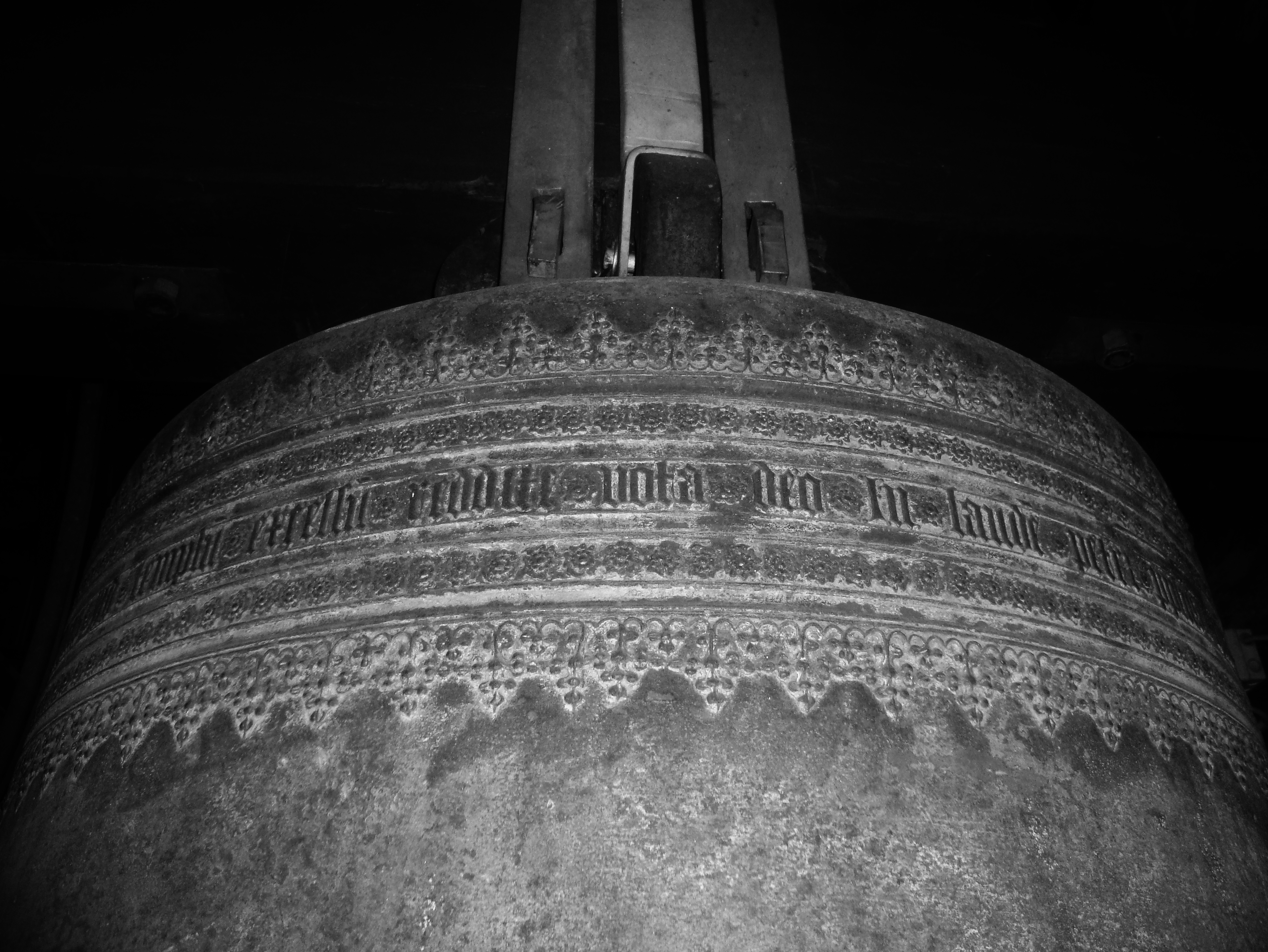 Recklinghausen, Propsteikirche St. Peter: Inschriftdetail der Petrusglocke von Gerhard van Wou (1505)